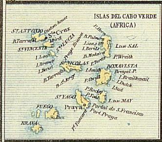 Islas de Cabo Verde. Detail from a map Nuevo mapa de España y Portugal y de sus colonias, ilustrado con los 49 escudos de sus Provincias y con las 14 Decoraciones Militares, indicando todos los caminos de hierro, carreteras, ríos y canales, Escala 1/165000